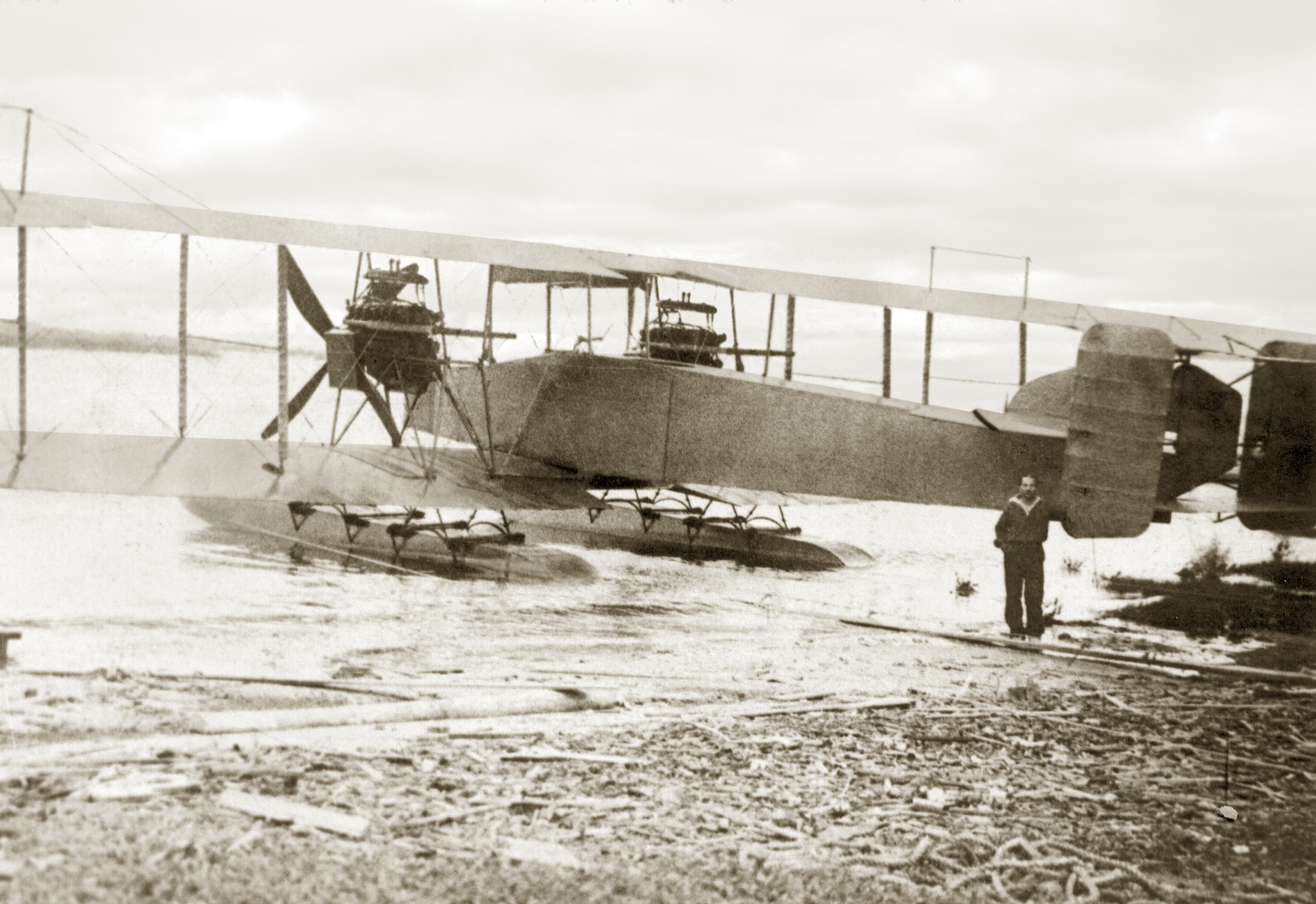 Первый в мире тарпедоносец ГАСН констркукции М.М. Шишмарева. Петербург, 1917 г.